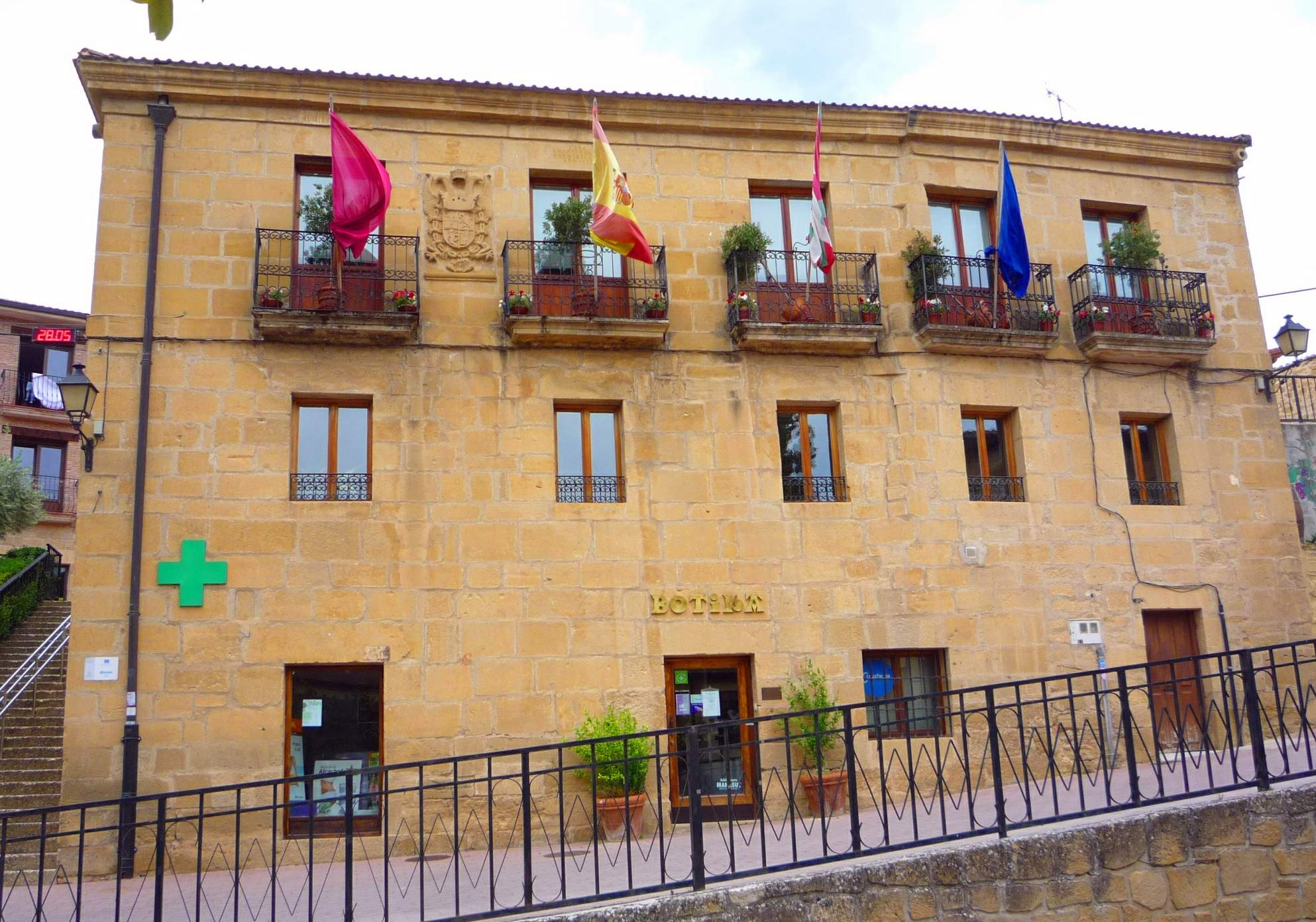 Ayuntamiento de Villabuena (Álava)